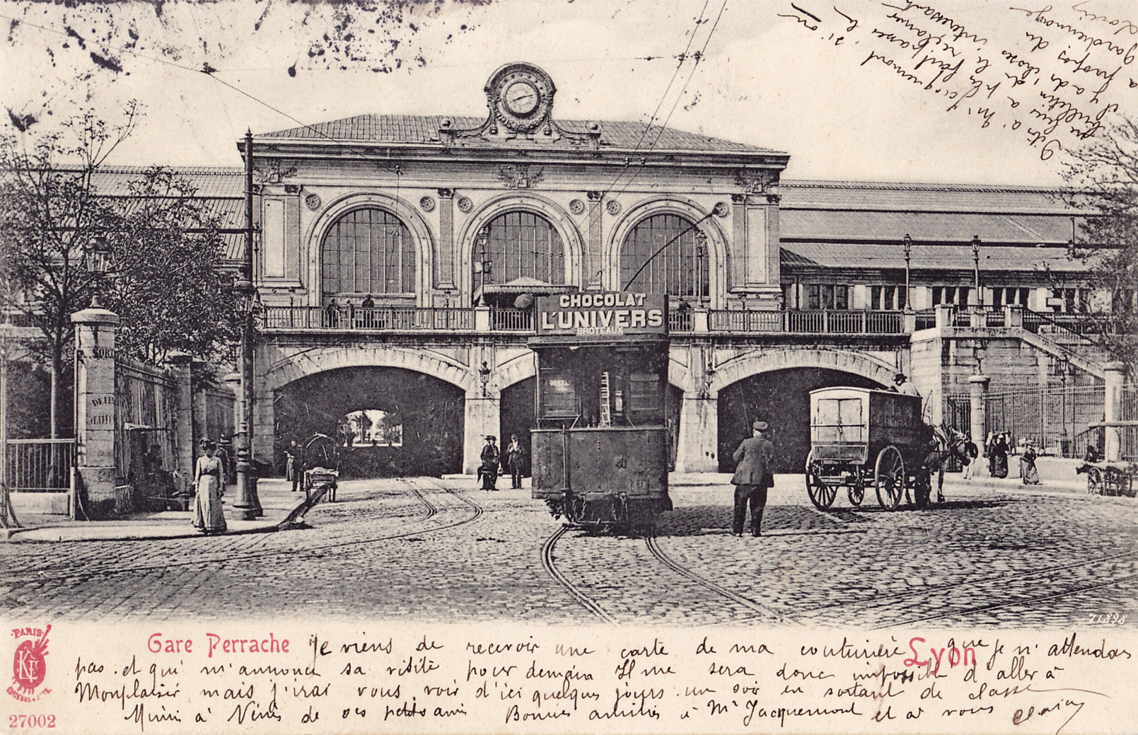 Carte postale ancienne éditée par KF, n°27002 :Gare Perrache